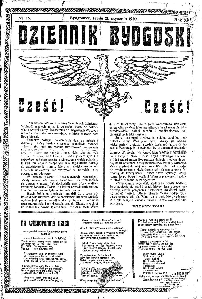 Dziennik Bydgoski, rok XIII, nr 16, 21 stycznia 1920 r., wiadomość o przekazaniu Bydgoszczy odrodzonemu państwu polskiemu